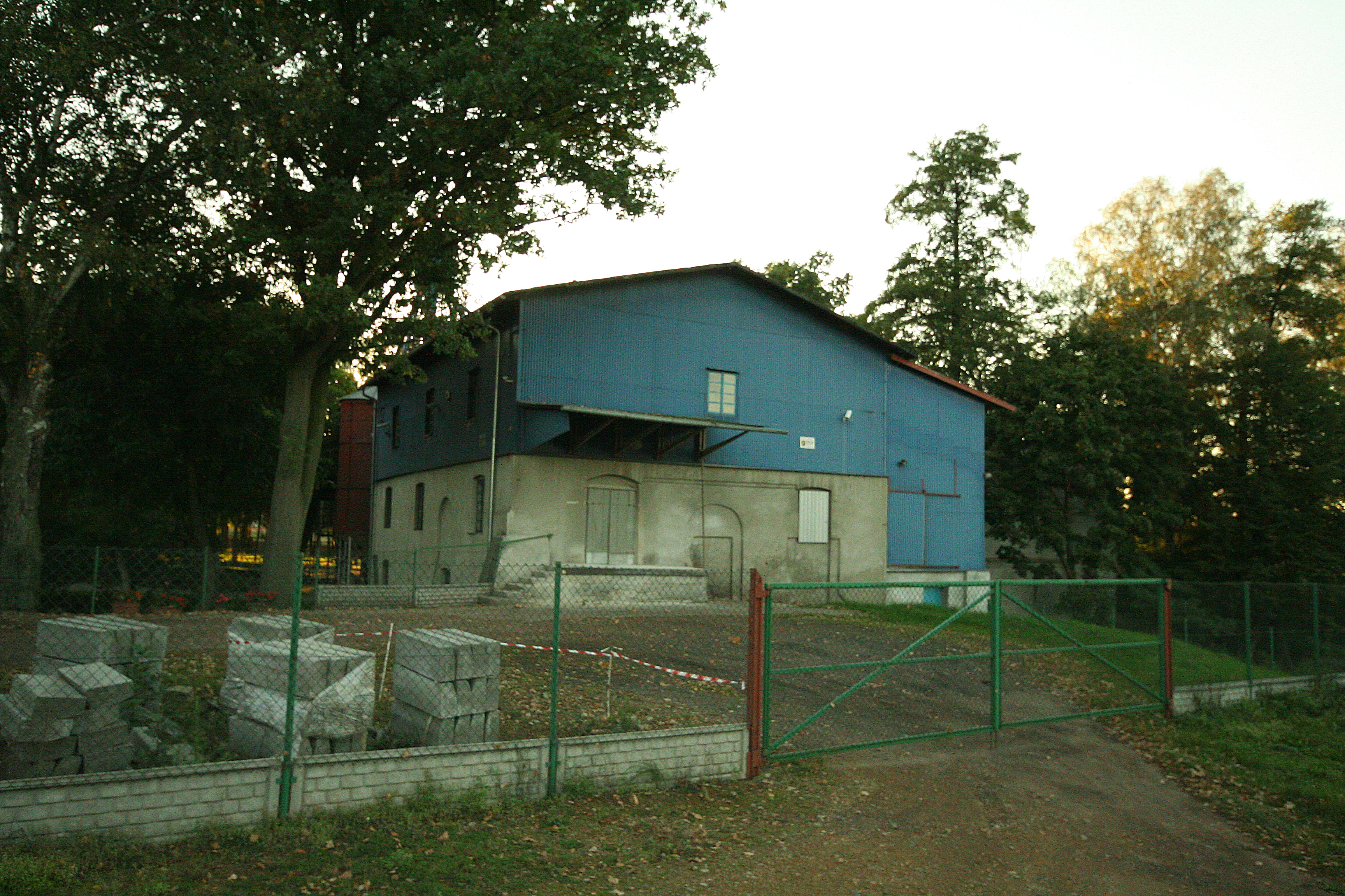 Kuźnica, ob. młyn, Kuźnica Stara, Przystajń